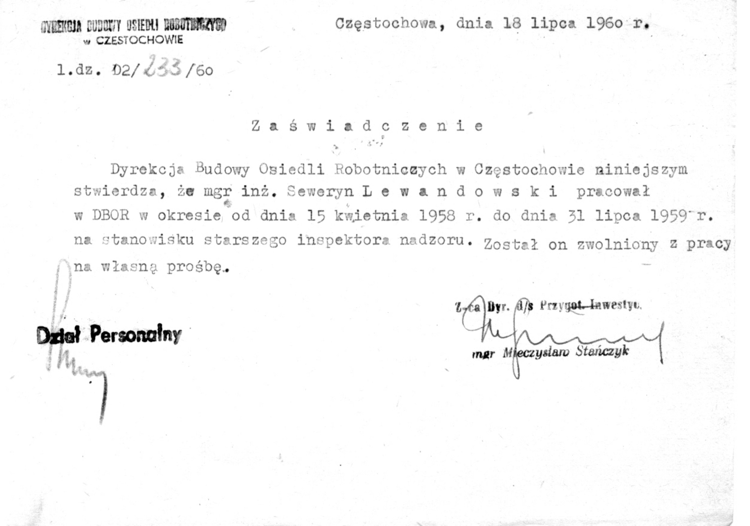 Poświadczenie zatrudnienia w Dyrekcji Budowy Osiedli Robotniczych w Częstochowie